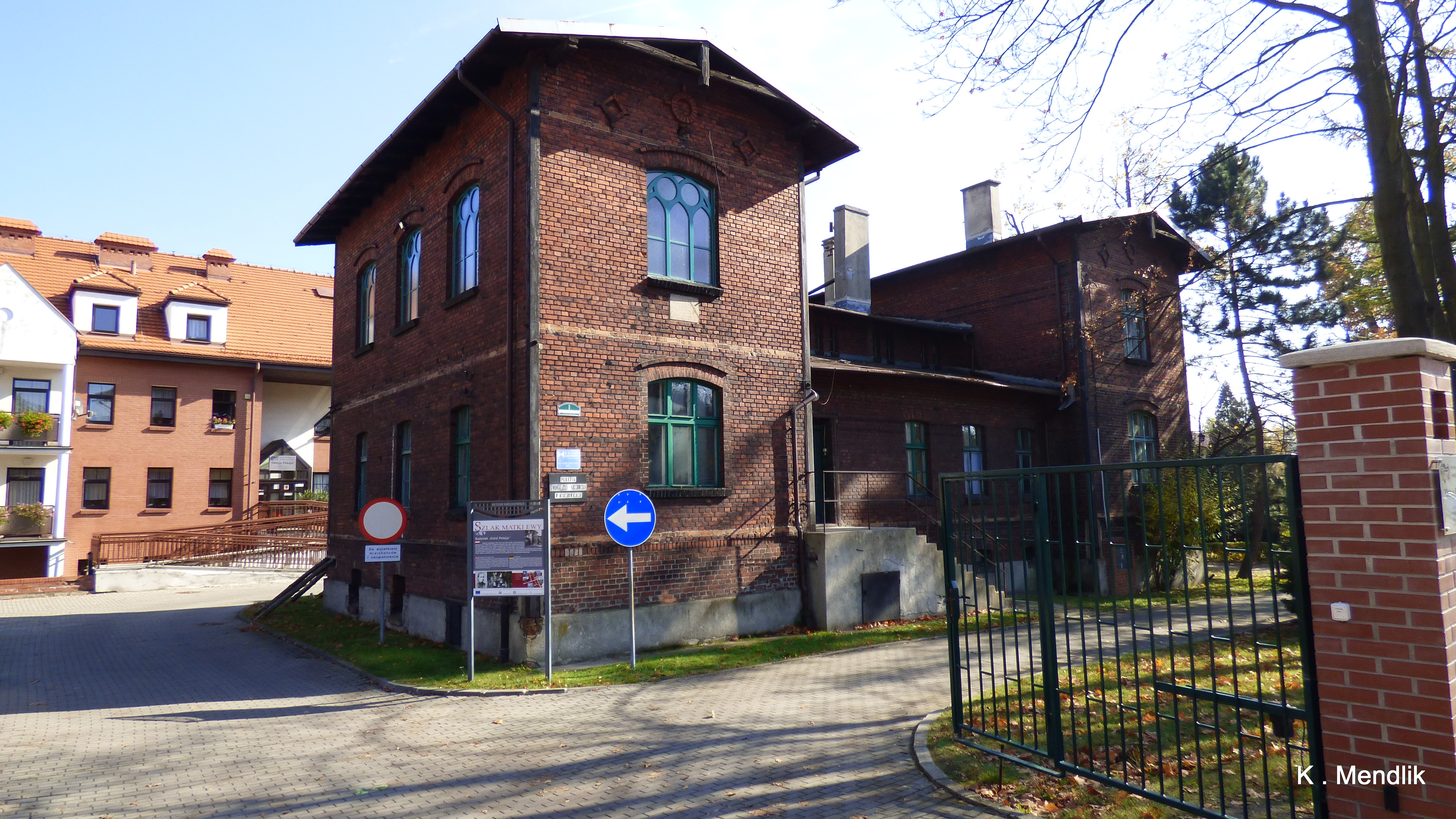 Bytom - Miechowice : Ewangelicki Dom Opieki „Ostoja Pokoju”